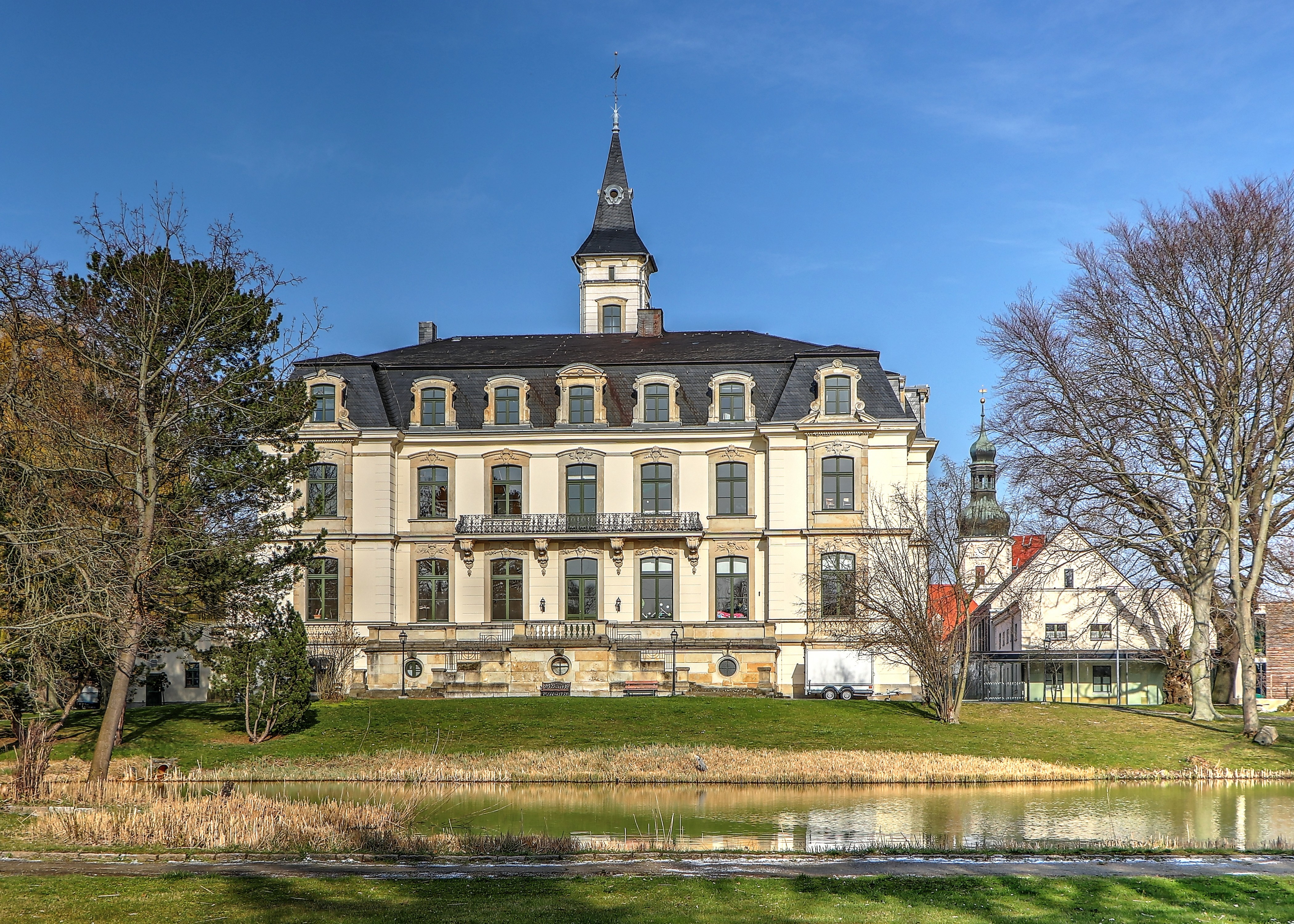 Das Schönefelder Schloss in Schönefeld (Leipzig) 2020 - Ansicht von Westen, rechts dahinter (ca. 200 Meter in östlicher Richtung) ist der Turm der Gedächtniskirche Schönefeld zu sehen - Das Schloss wurde 1871 bis 1876 nach der Zerstörung in der Völkerschlacht bei Leipzig 1813 im Auftrag von Baroness Clara Hedwig von Eberstein errichtet. Architekt war Bruno Leopold Grimm, der das Schloss im Stile des Neobarocks nach französischem Vorbild entwarf.